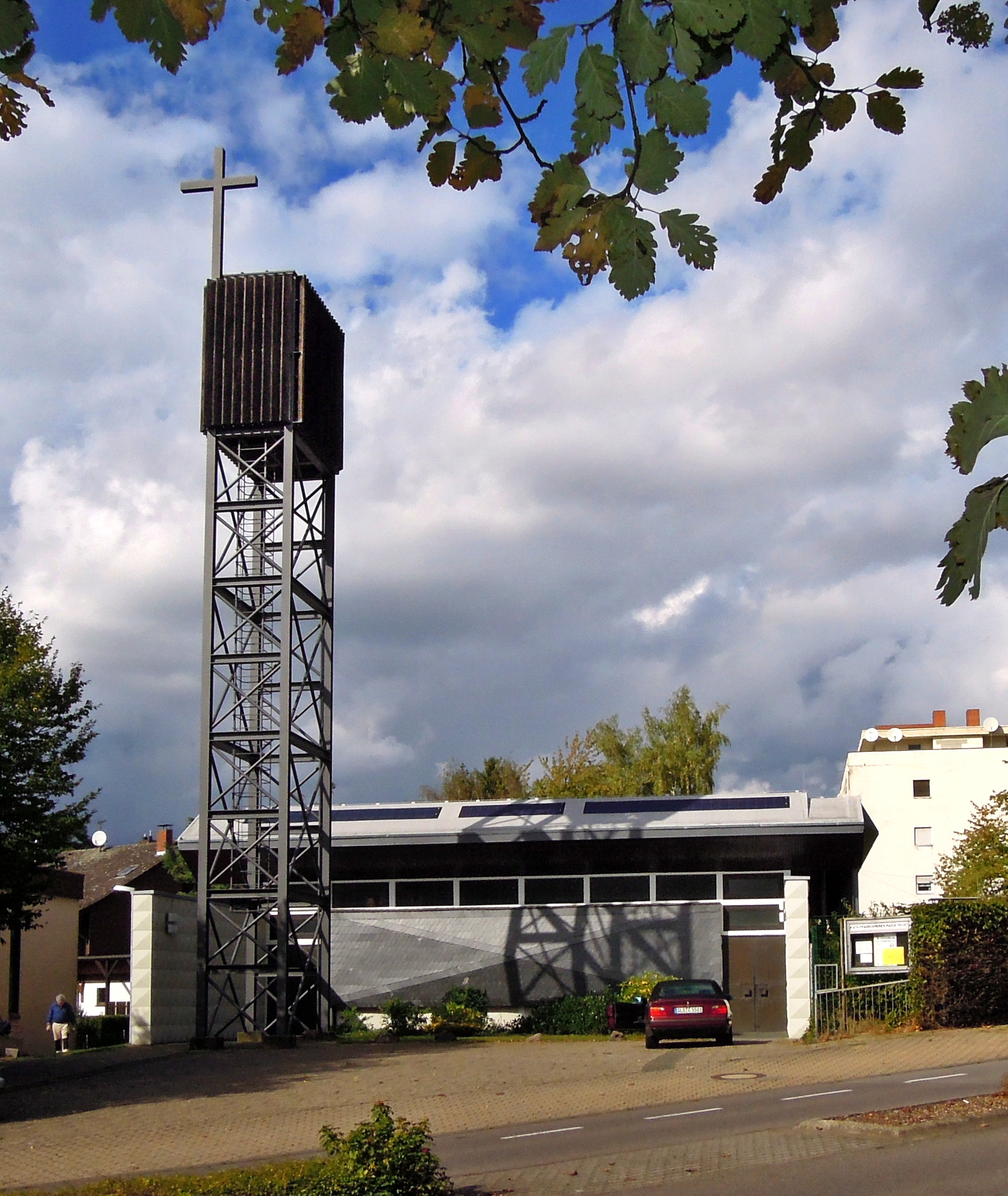 Berliner Straße o. Nr., Flur 3, Flurstück 202, 203, 181/12, 181/87, Pfarrzentrum mit kath. Pfarrkirche Maria Trost und Kindergarten, 1961-63 von Konrad Schmitz (Einzeldenkmal)